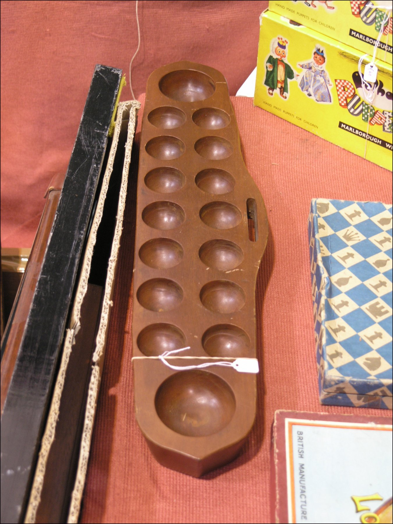 Mancala (Essen Spiel'07)